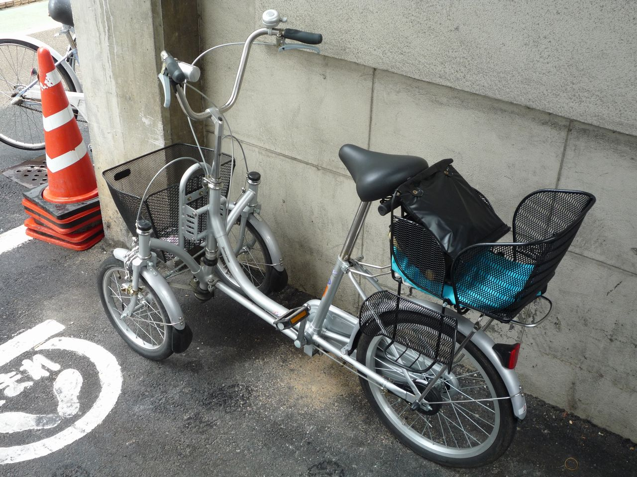 日本の3輪自転車 ブリヂストン・ミンナ